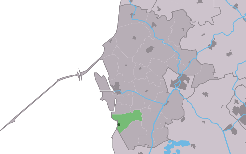 Kaartsje fan himrik fan Gaast